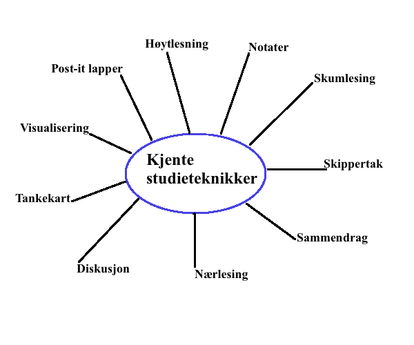 Tankekart av kjente studieteknikker.